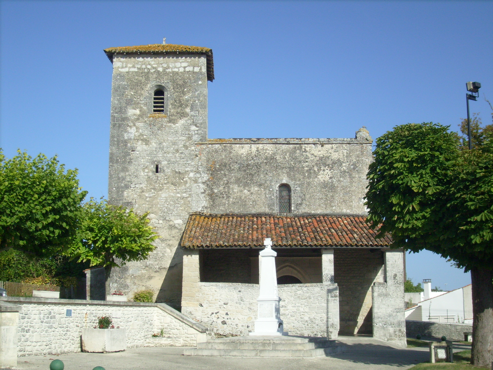 L'église de Dompierre-sur-Charente